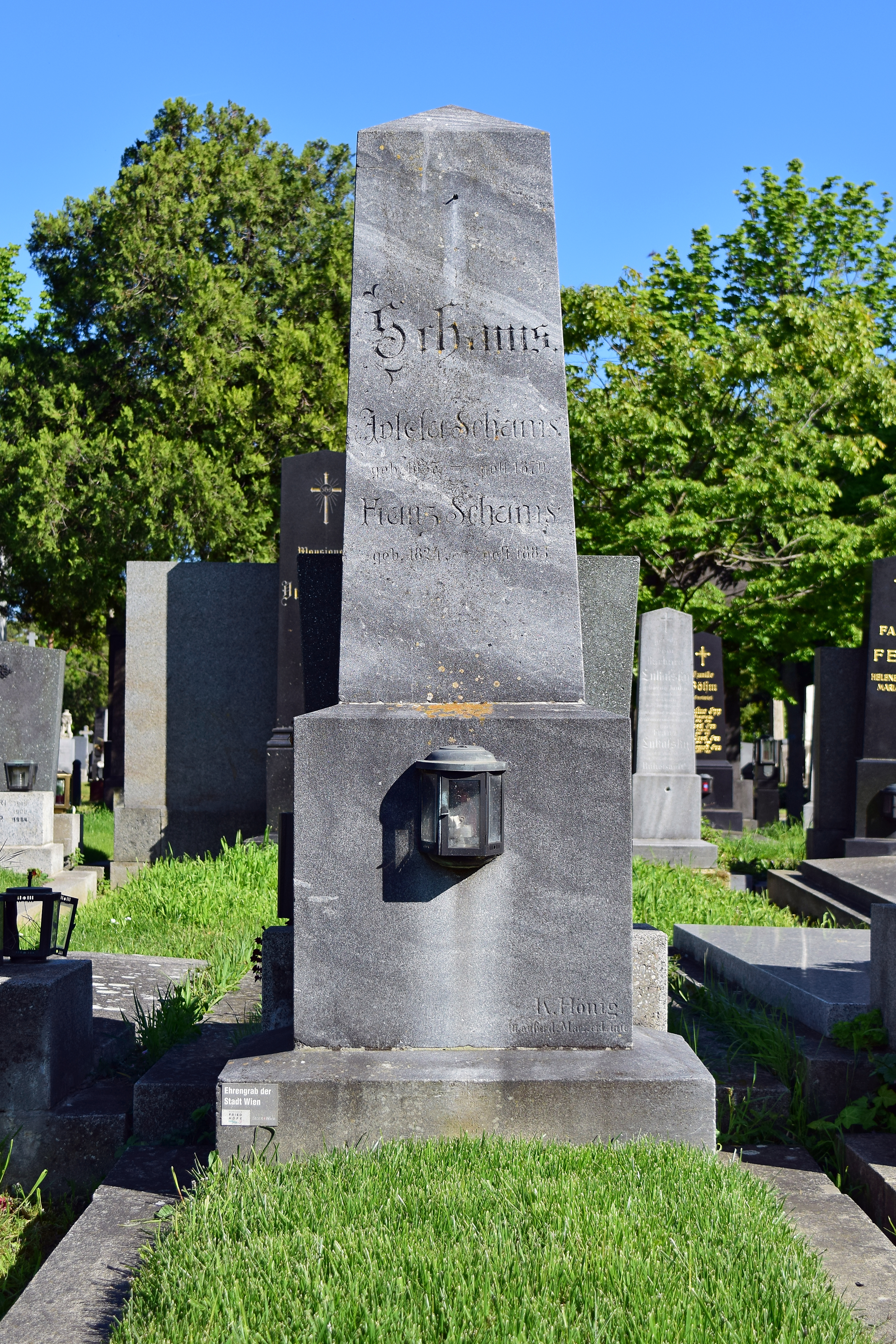 Ehrenhalber gewidmetes Grab von Franz Schams auf dem Wiener Zentralfriedhof.